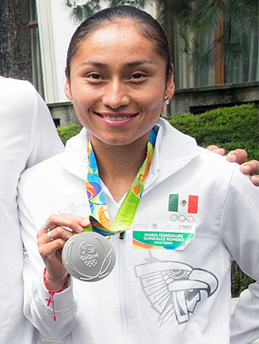 El Presidente Enrique Peña Nieto se reunió hoy con los deportistas que integraron la delegación mexicana que participó en los Juegos Olímpicos de Río de Janeiro 2016, a quienes les expresó su reconocimiento por el esfuerzo, la entrega, el empeño y el coraje que demostraron en esta justa olímpica y durante el proceso para llegar a ella.